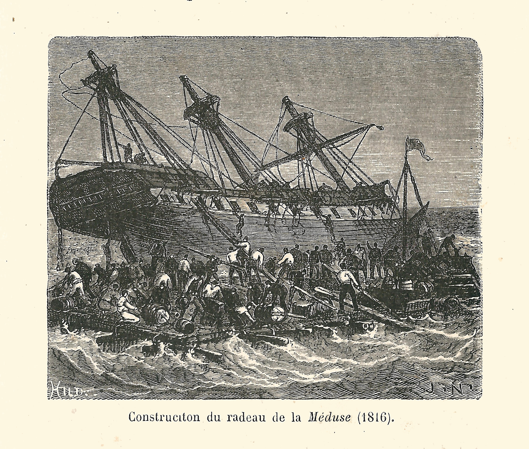 Gravure de Jules Noël tirée de : Zurcher & Margollé, Les Naufrages célèbres, Paris : Hachette, 3e édition, 1877 -- Construction du radeau de la Méduse, en 1816.